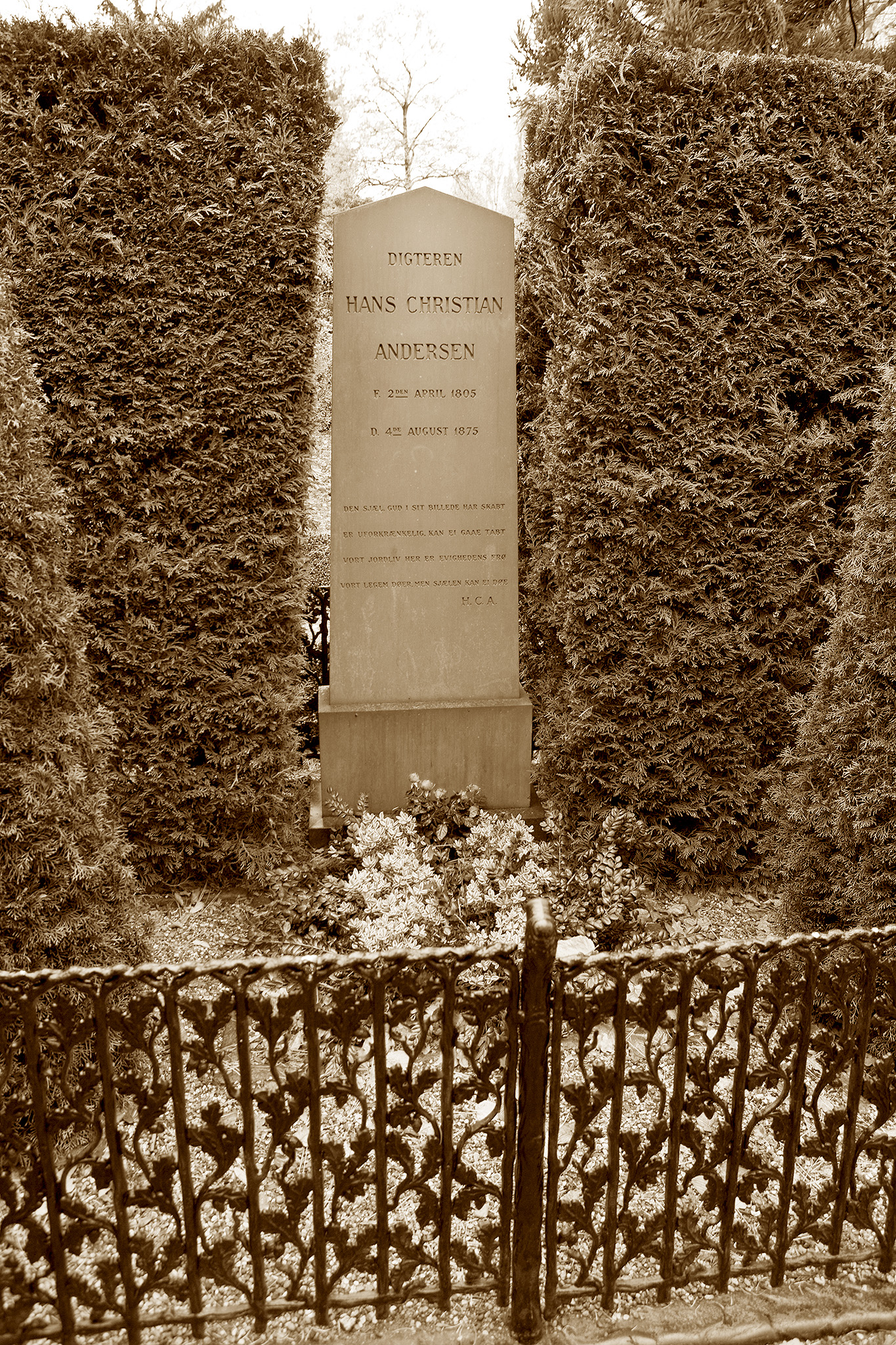 Hrob Hanse Christiana Andersena